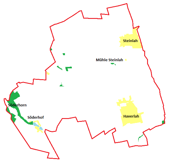 Lageplan der Ortsteile von Haverlah innerhalb der Gemeinde